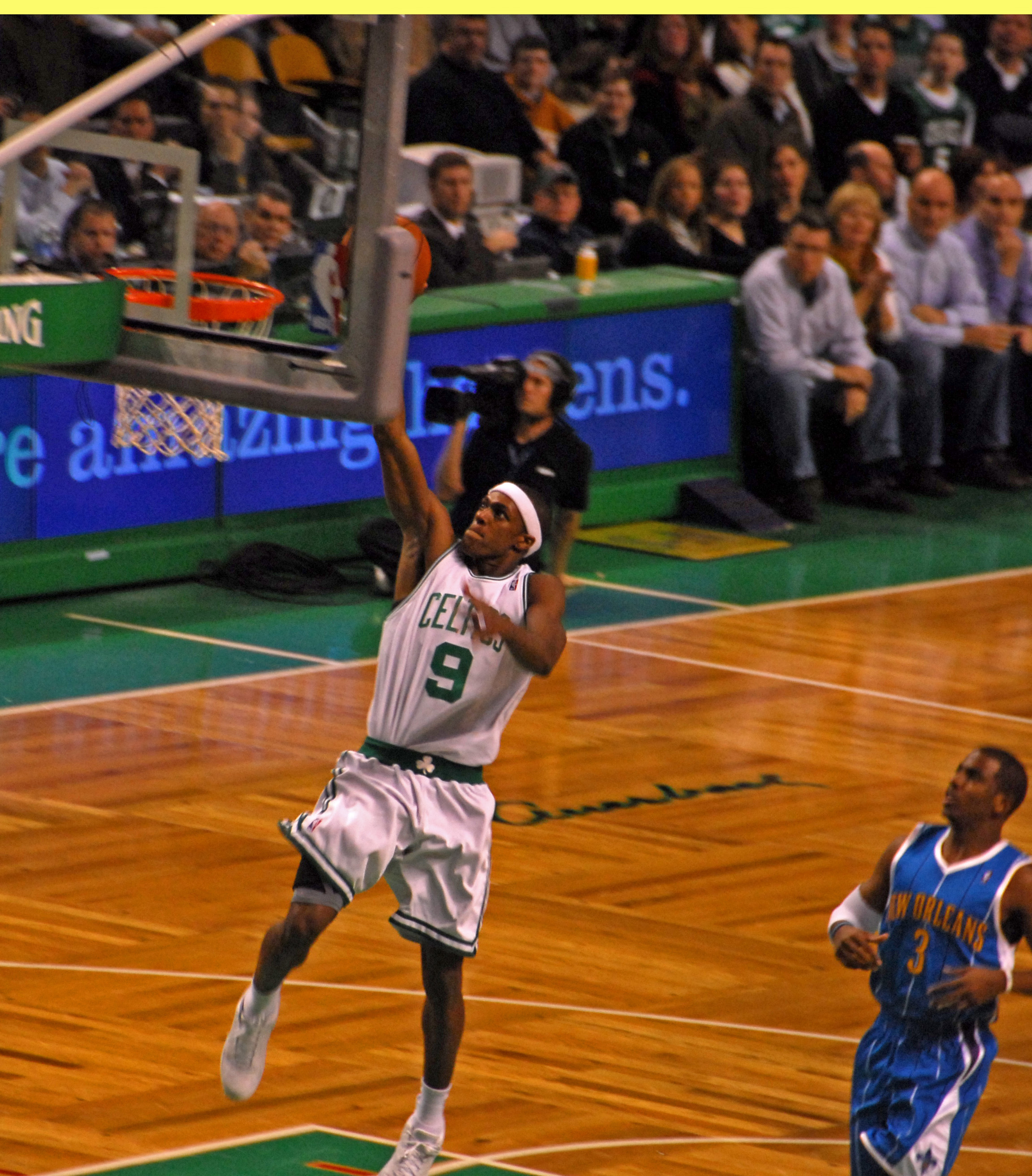 Rajon Rondo zakucava tijekom utakmice sa Hornetsima.